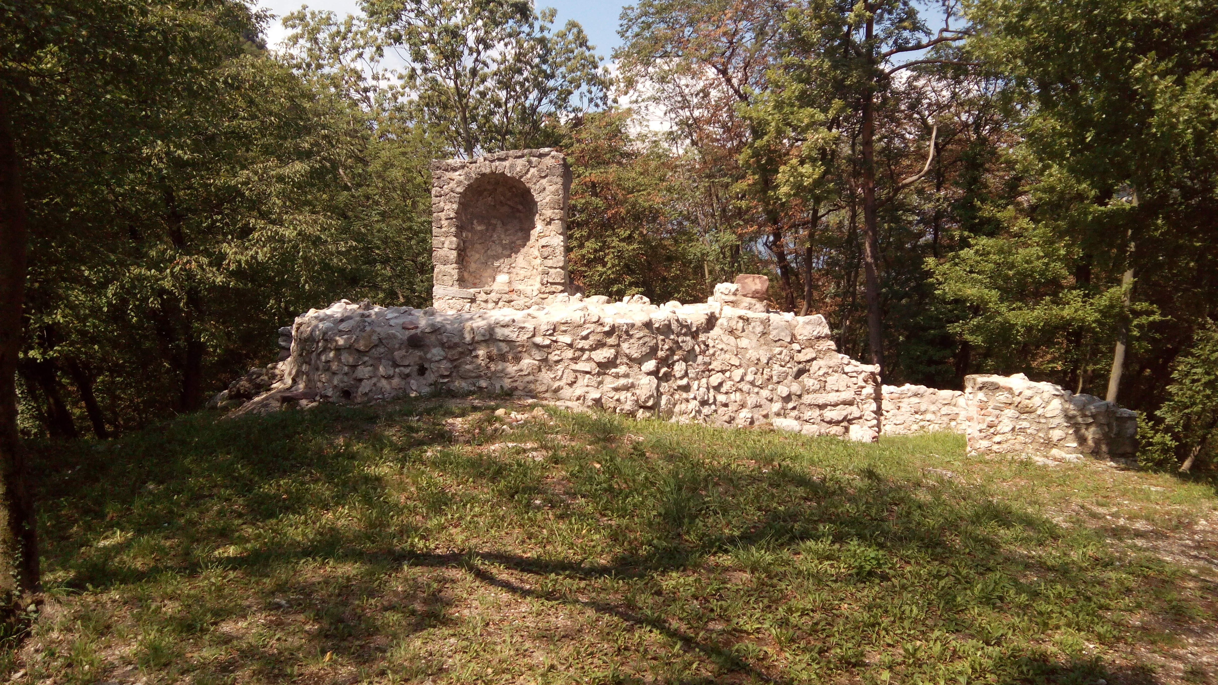 Isola di Sant'Andrea (area archeologica) This is a photo of a monument which is part of cultural heritage of Italy.